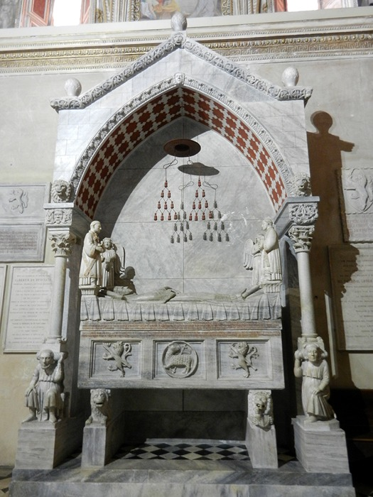 Bergamo - Tomba del cardinale Guglielmo Longo degli Alessandrini, realizzata da Ugo da Campione (1330) nella Basilica di S. Maria Maggiore